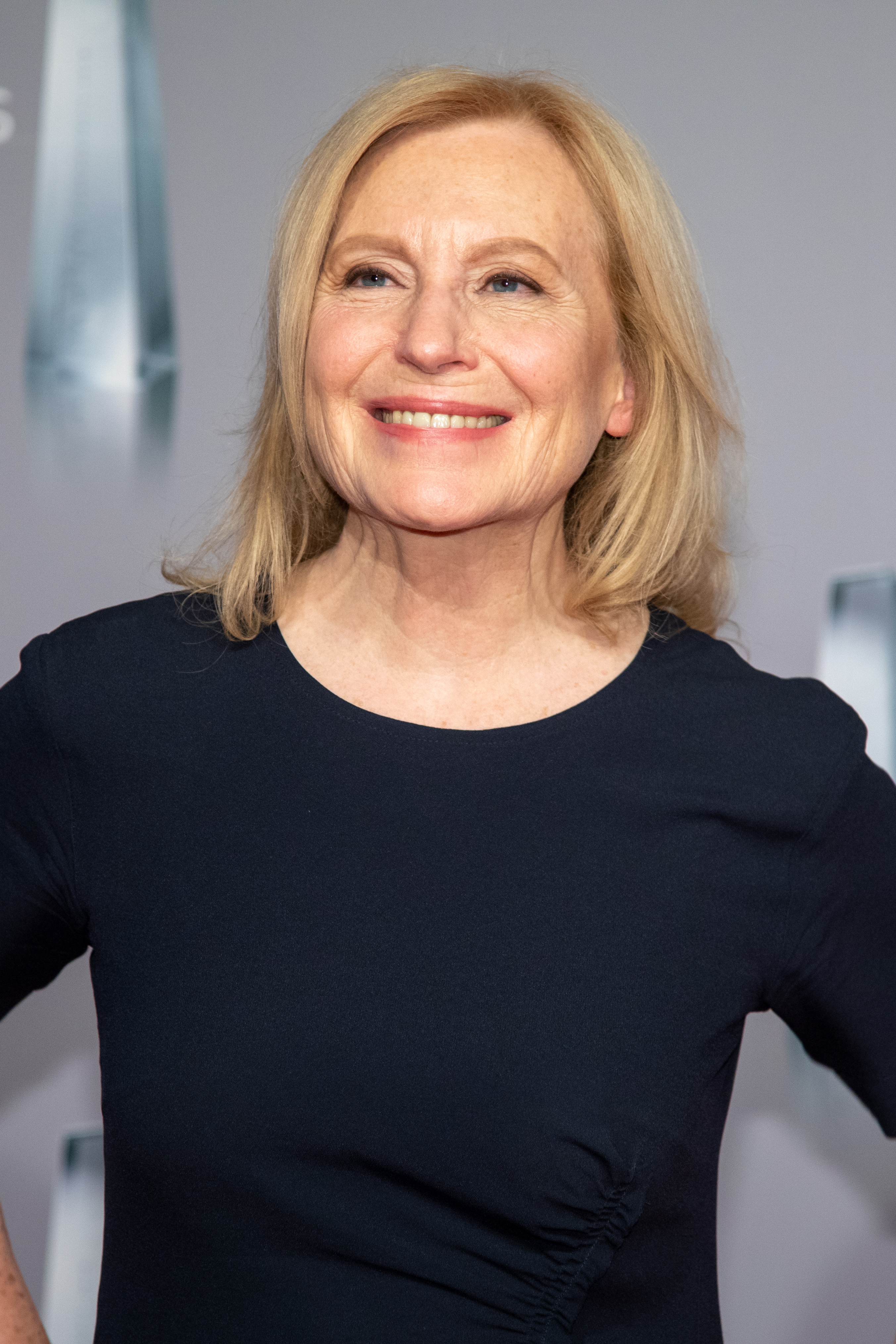 Maren Kroymann beim Deutschen Fernsehpreis 2019 in der Düsseldorfer Rheinterrasse